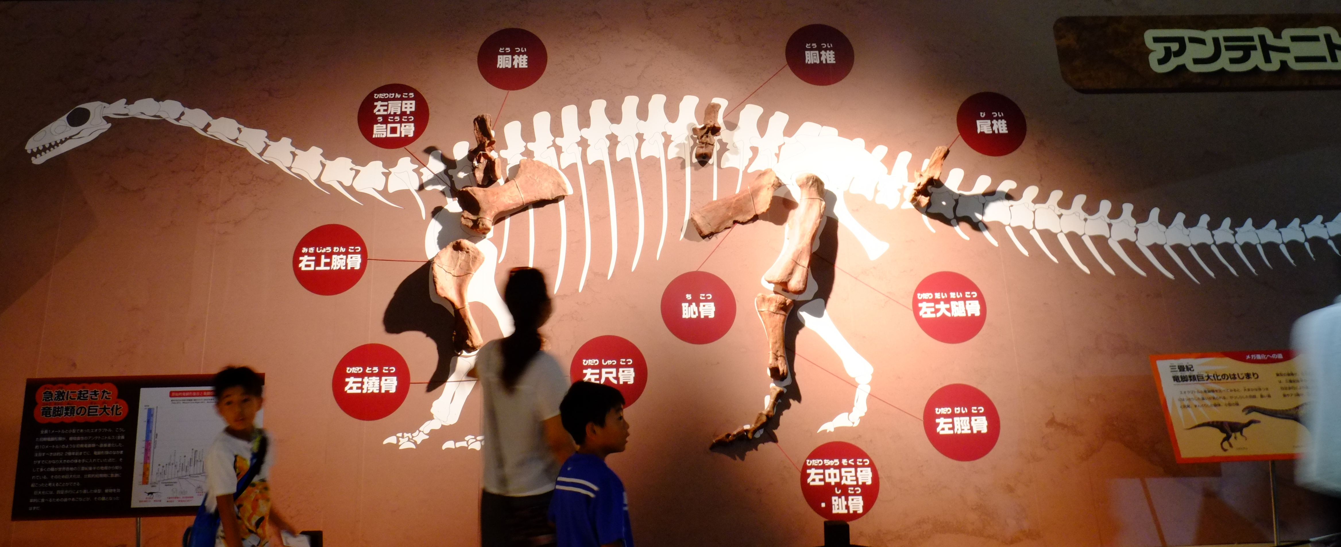 後期三畳紀では最大級の恐竜と考えられている。 成体では全長15メートルにもなるらしい。